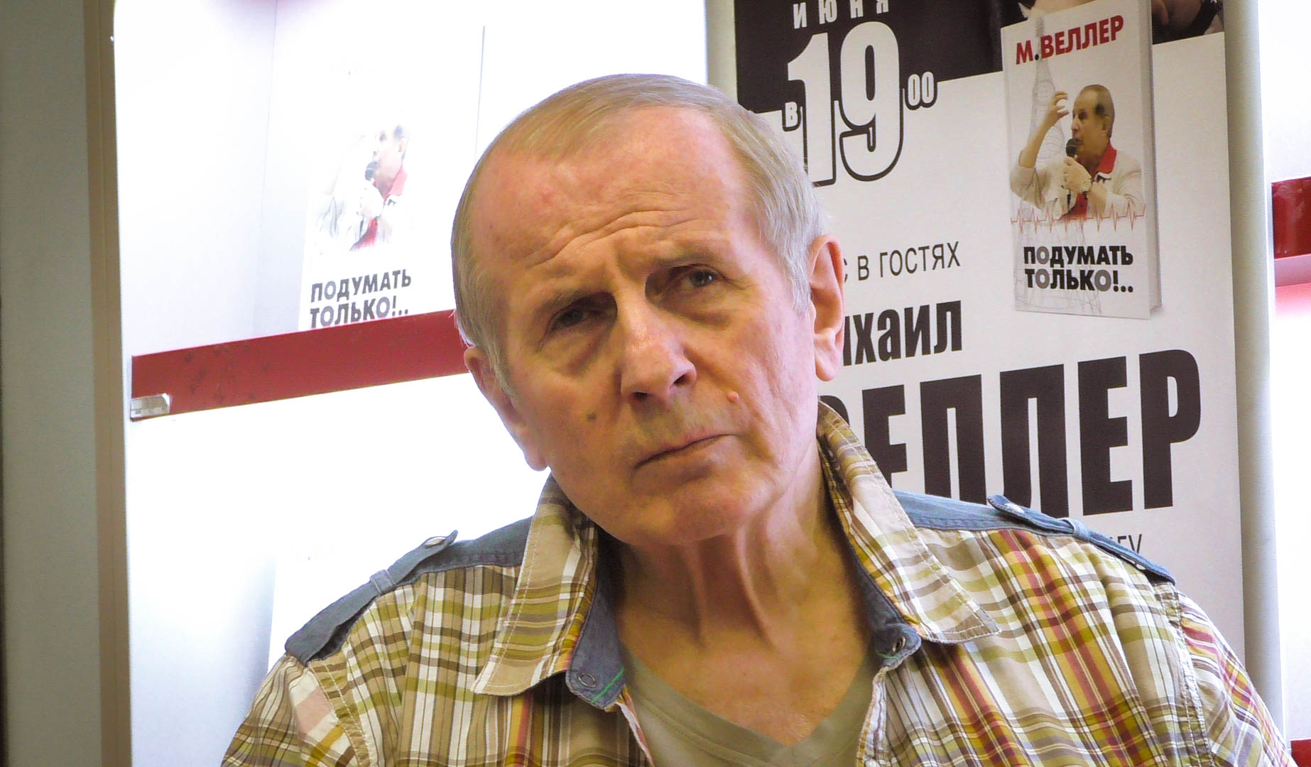 Михаил Веллер. Презентация книги "Подумать только" в книжном магазине "Москва" 28.06.2017.